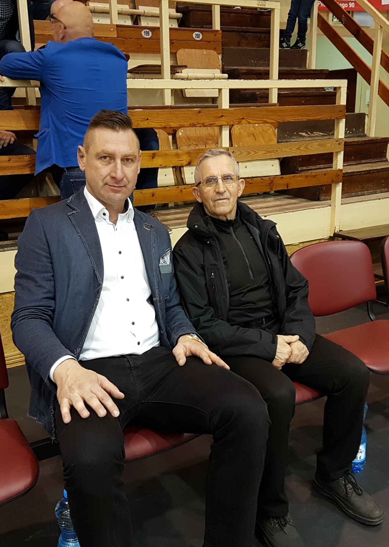 Stargard, 06.05.2017r. Ryszard Janik z Wiktorem Grudzińskim